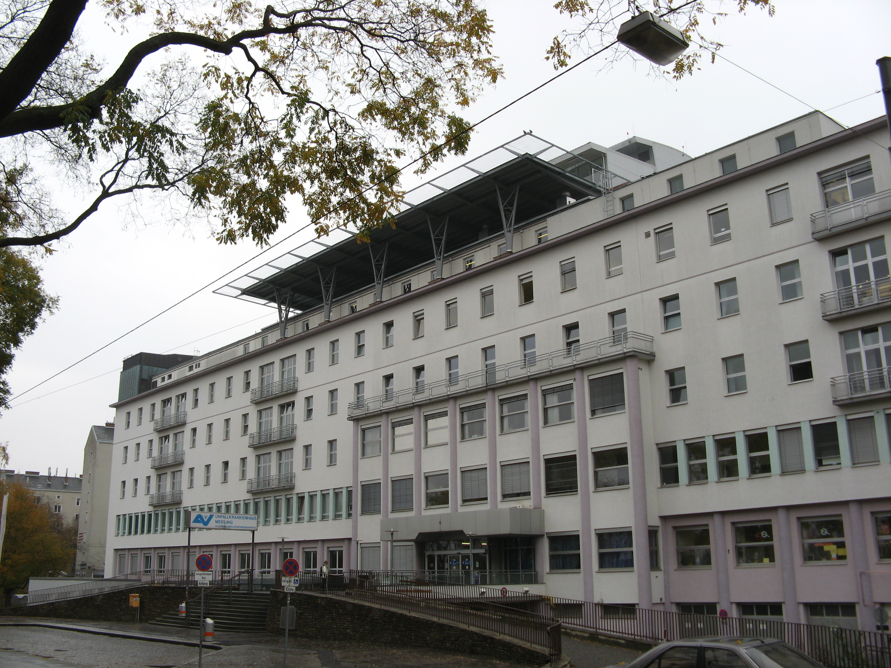 Unfallkrankenhaus Meidling, Wien-Meidling